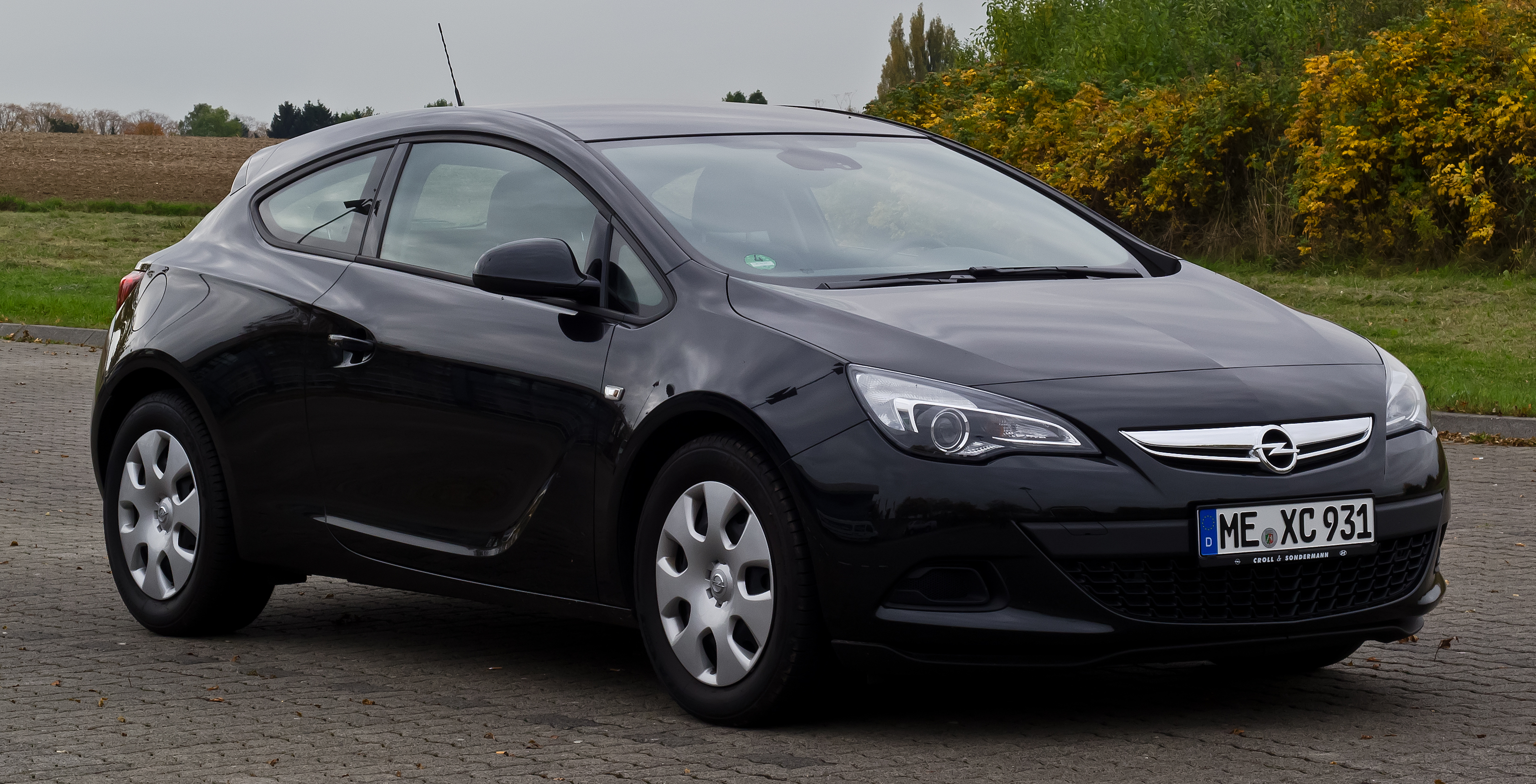 Opel Astra GTC 1.4 Turbo ecoFLEX Edition (J)